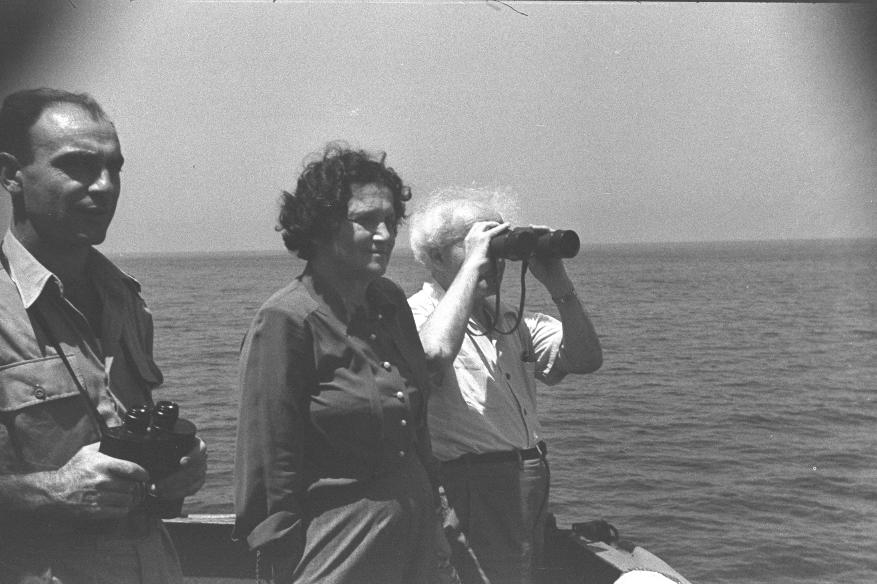 PM DAVID BEN GURION AND HIS WIFE PAULA WENT ON A WEEK END CRUISE IN THE MEDITERANEAN ABOARD AN ISRAEL WAR SHIP. Photograph: GPO. 29/07/1949. ראש הממשלה דוד בן גוריון ורעיתו פולה בשיט על סיפון אניית קרב, בים התיכון.